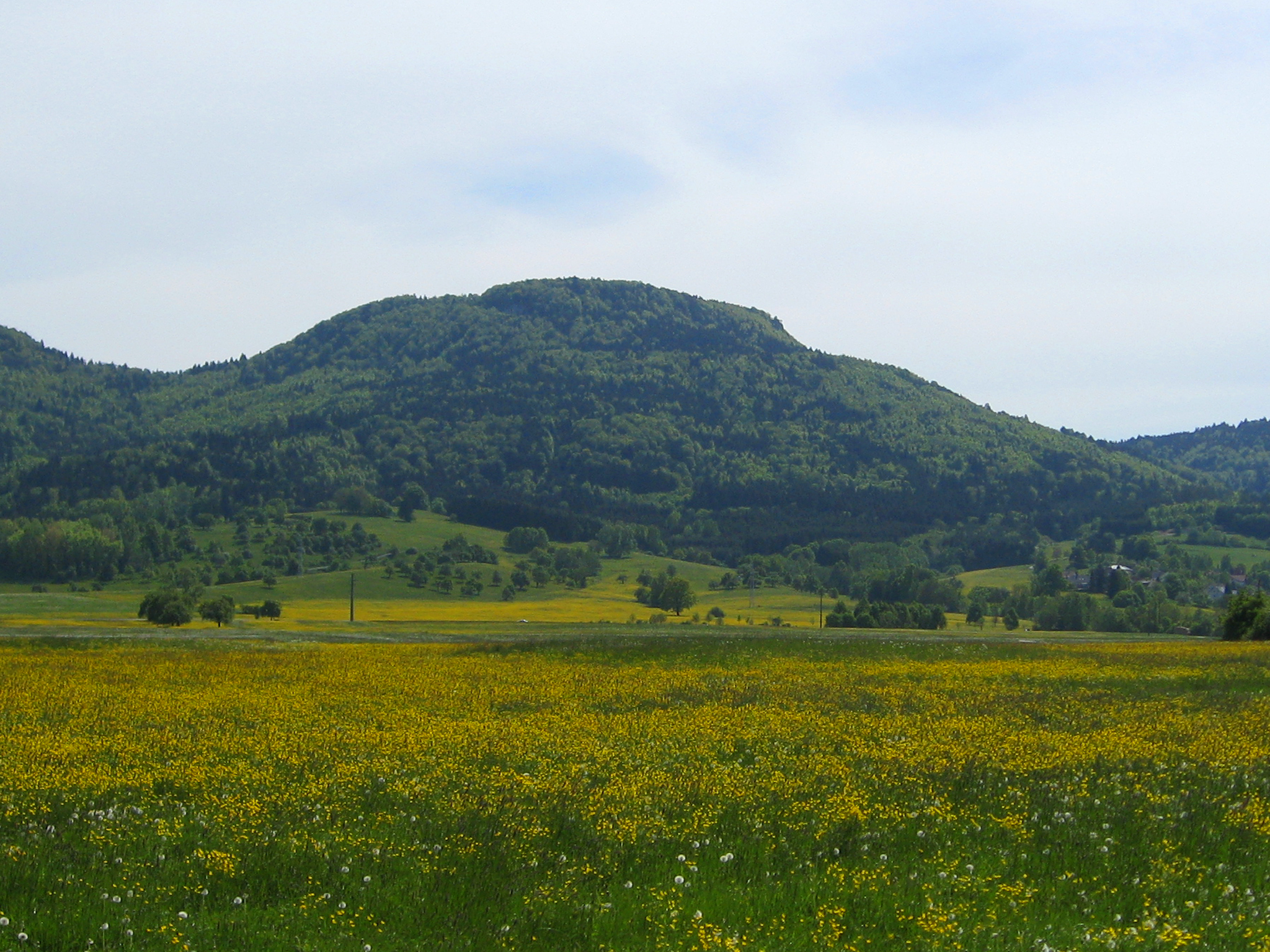 Schafberg vom nördlichen Albvorland aus gesehen